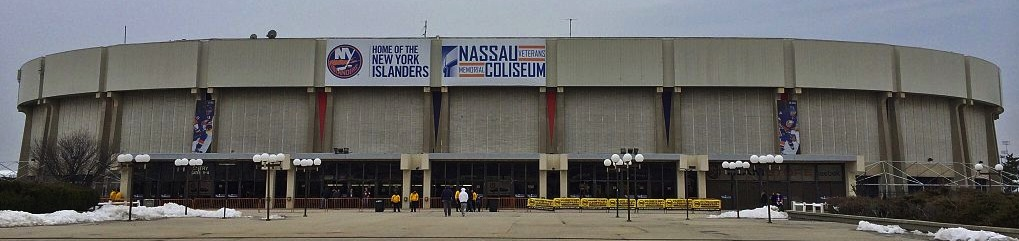 Nassau Coliseum April 2014